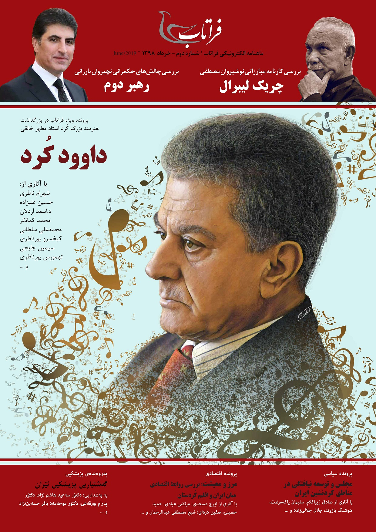 پرونده ویژه فراتاب در بزرگداشت هنرمند بزرگ کرد استاد مظهر خالقی